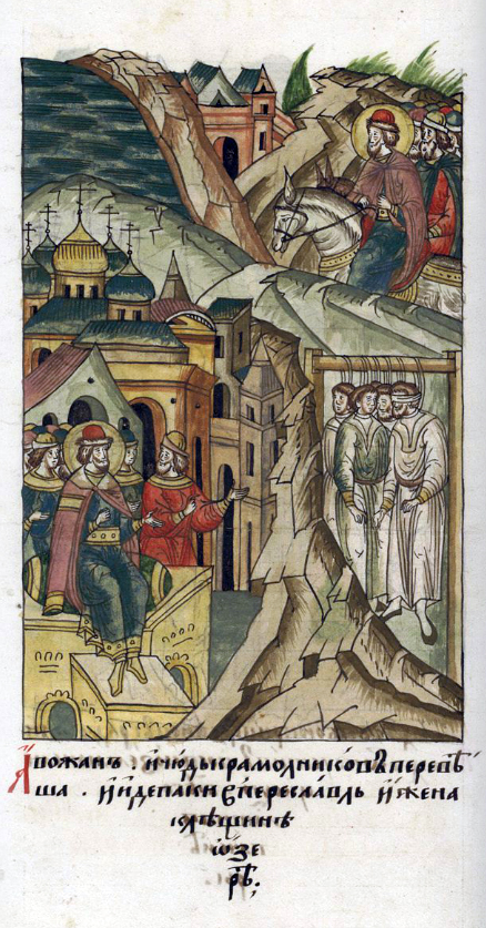 [И вышел князь Александр вскоре, с новгородцами, и с ладожанами, и с карелами, и с ижорцами, к городу немецкому Копорье. И разрушил князь Александр город до основания; а самих немцев убил. А некоторых немцев князь Александр с собой привел в Новгород, а других отпустил в их землю немецкую, ибо был Александр милостив сверх меры.] А мятежников из племен води и чуди Александр перевешал, и пошел затем в Переславль, что на Клещине озере.